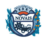 Brasão da cidade de Novais, SP